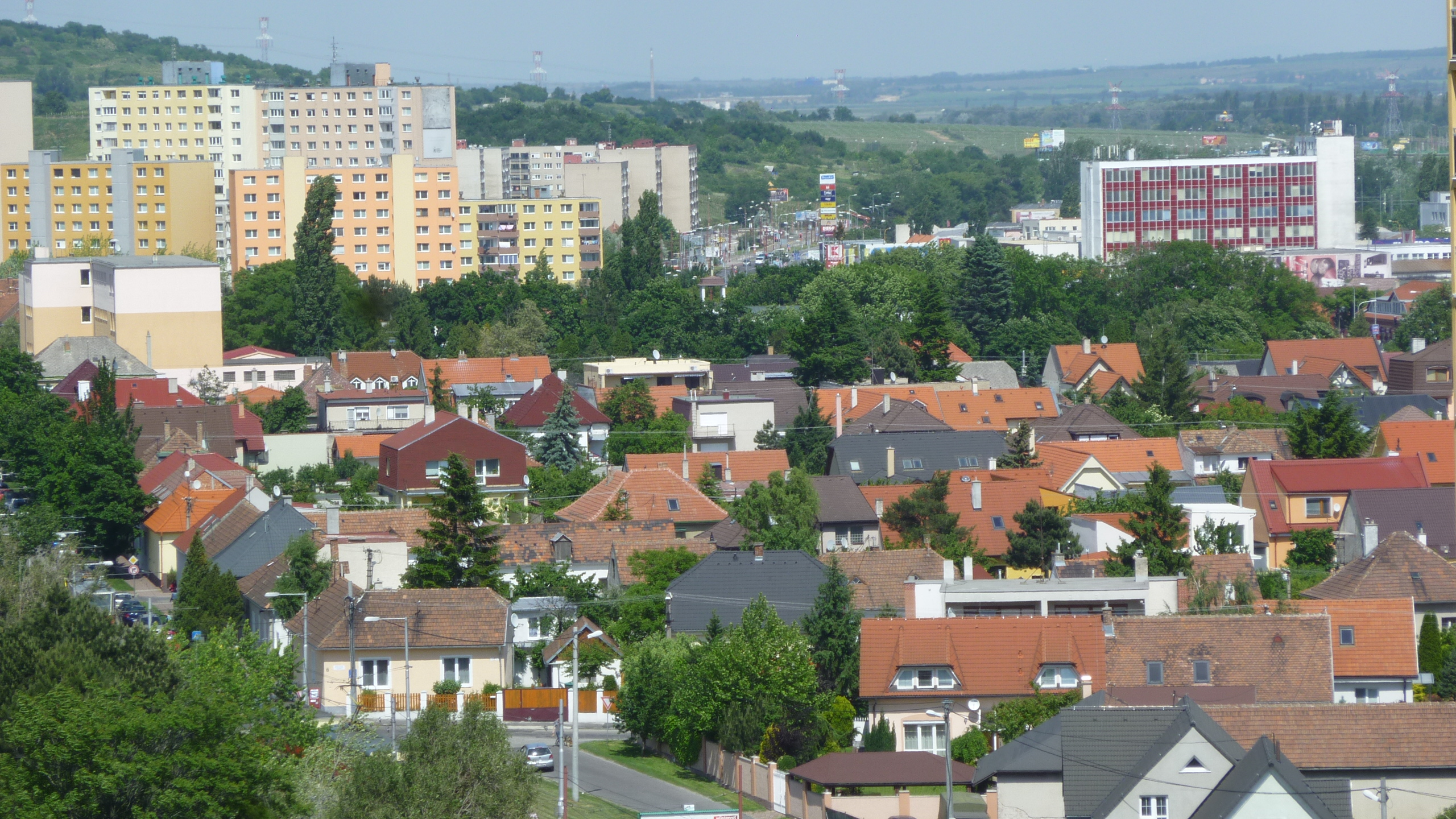 STARÁ RAČA vs. NOVÁ RAČA